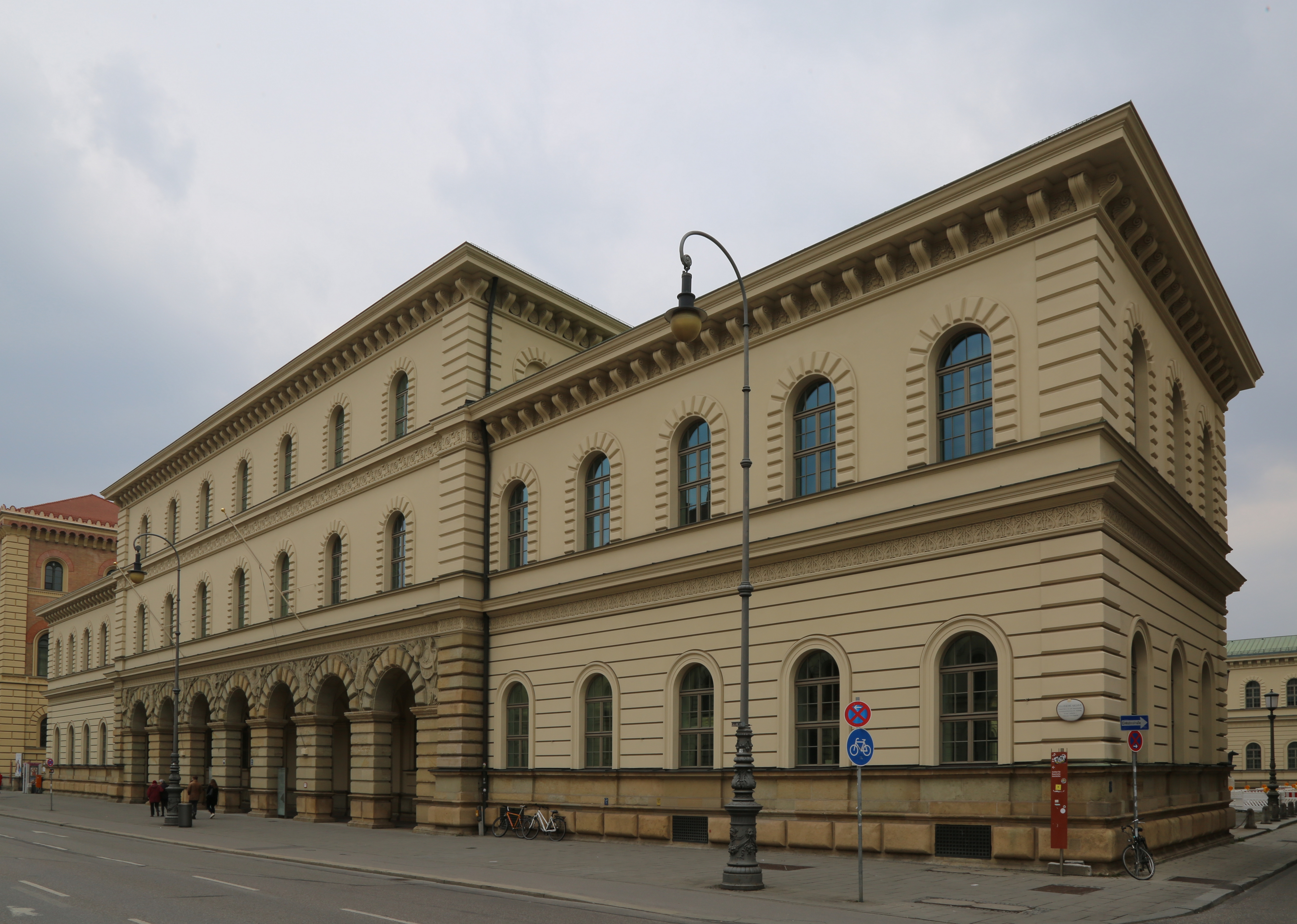 Bayerisches Hauptstaatsarchiv und Staatsarchiv München.,Der Bau wurde 1822 als Bayerisches Kriegsministerium durch den Architekten Leo von Klenze errichtet. Es steht in der Ludwigstraße 14, sein Hauptflügel erstreckt sich entlang der Schönfeldstraße.